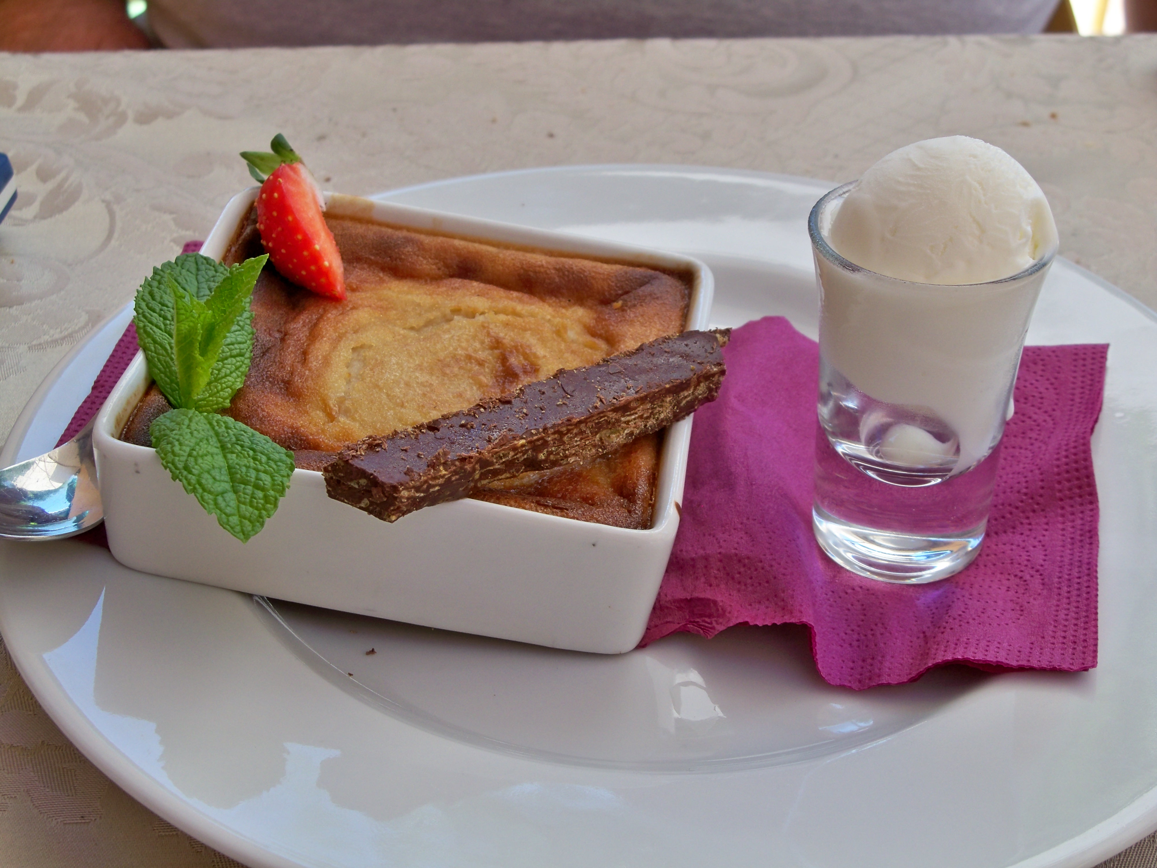 Flan de chataignes corses